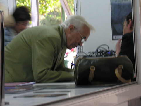 Neira Vilas asinando un libro na Feira do Libro de Santiago de Compostela no ano 2006. Galicia. España Publish by= Luis Miguel Bugallo Sánchez. Self made